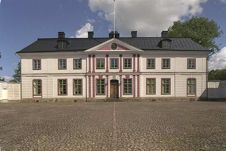 Huvudbyggnadens västra fasad. Motiv: Stora Eks herrgård Nyckelord: Byggnadsminnen Kategori: Herrgård Huvudbyggnadens västra fasad.